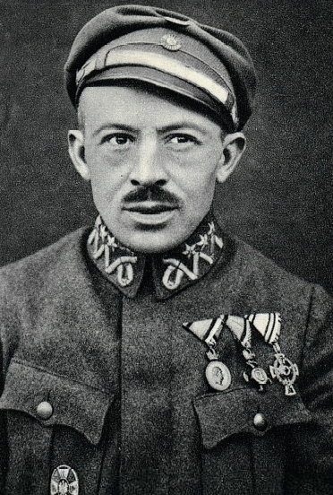 Kpt dr Wiktor Matczyński w czasie służby w Legionach Polskich.